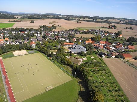 Wüsten Luftbild mittels Flugroboter